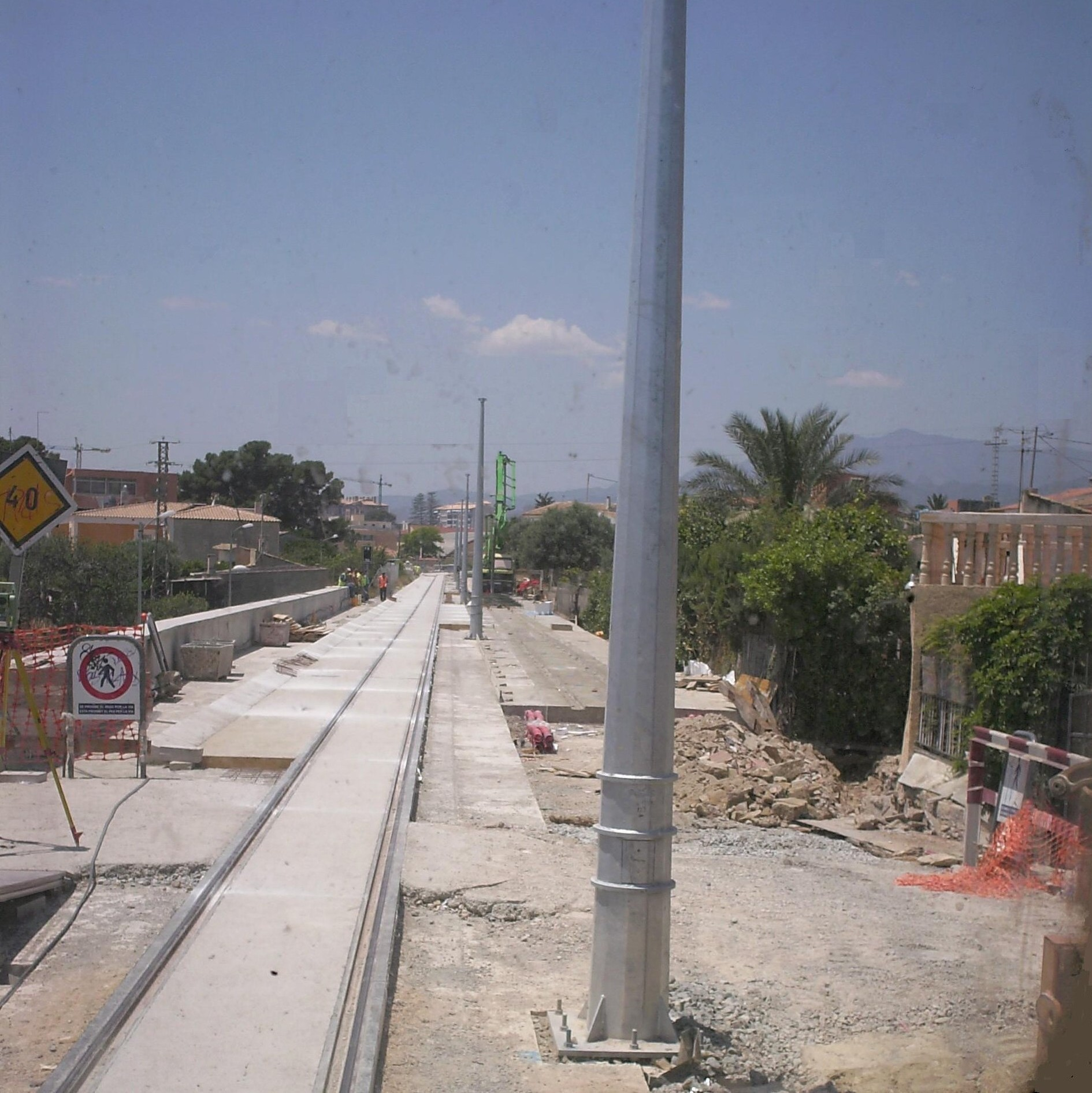 Elektrifizierung und zweigleisiger Ausbau zwischen Benidorm und La Vila Joiosa / Electrificación y construcción de la segunda vía entre Benidorm y Villjoyosa